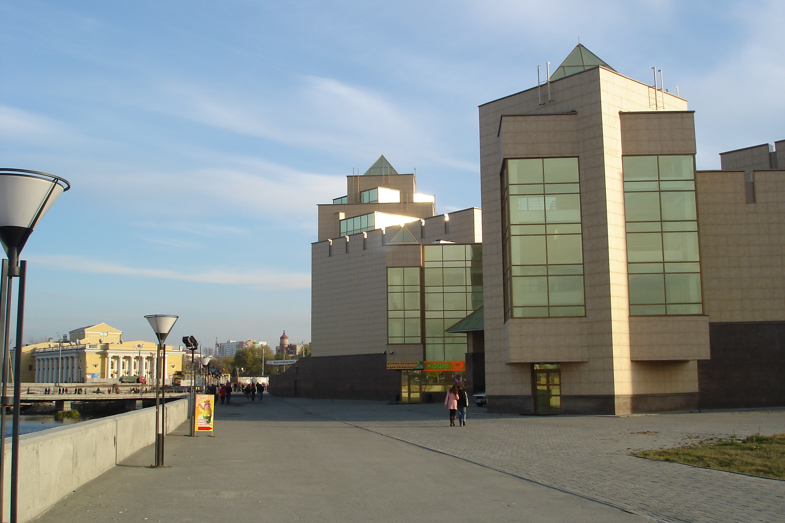 Краеведческий музей Челябинска